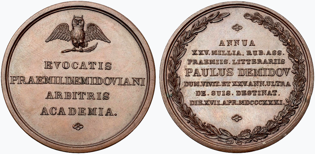 Демидовская премия, аверс медали